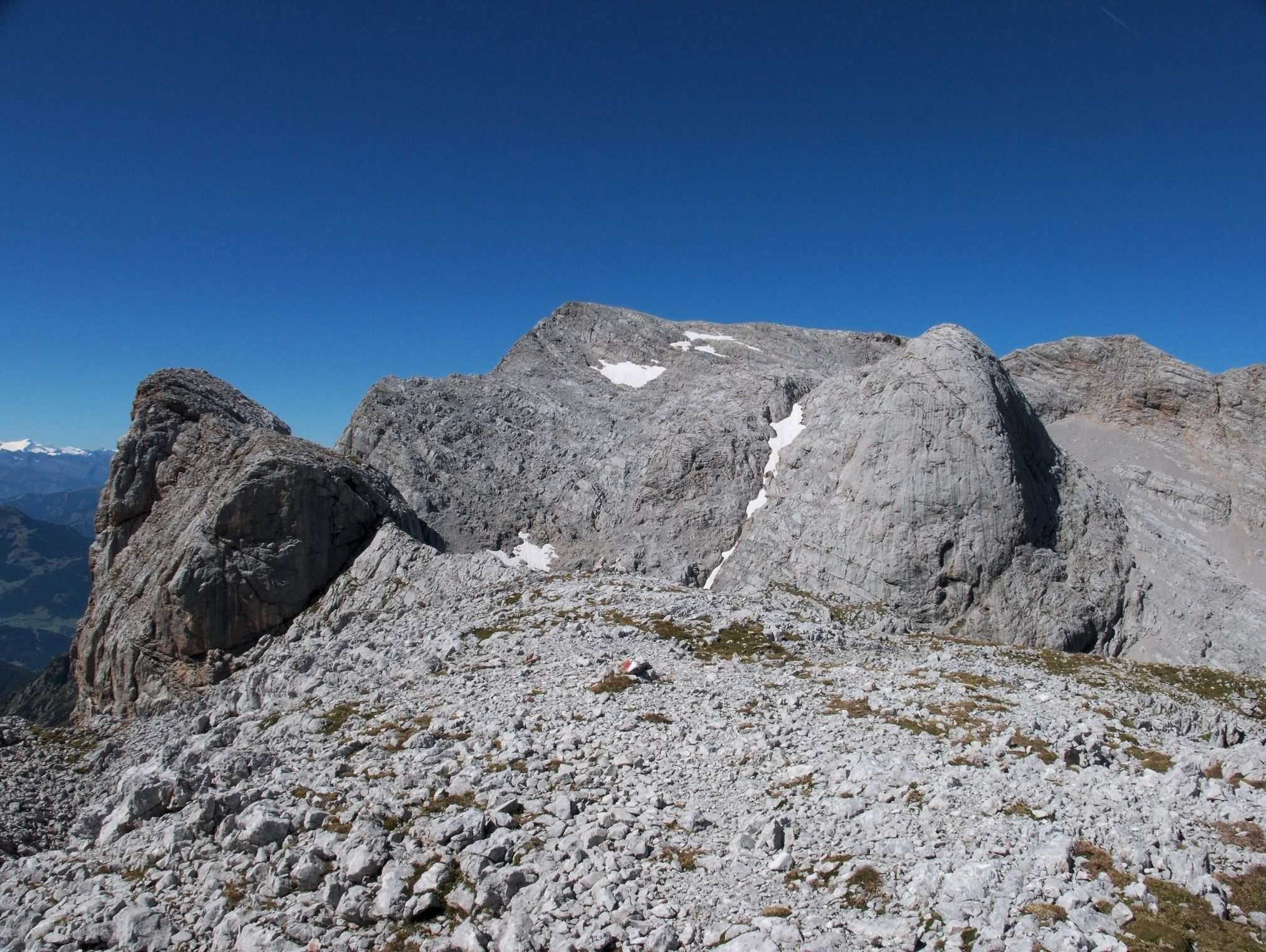 Kleines Brandhorn (links), Brandhorn (Mitte) und Kohlhaufen (rechts)